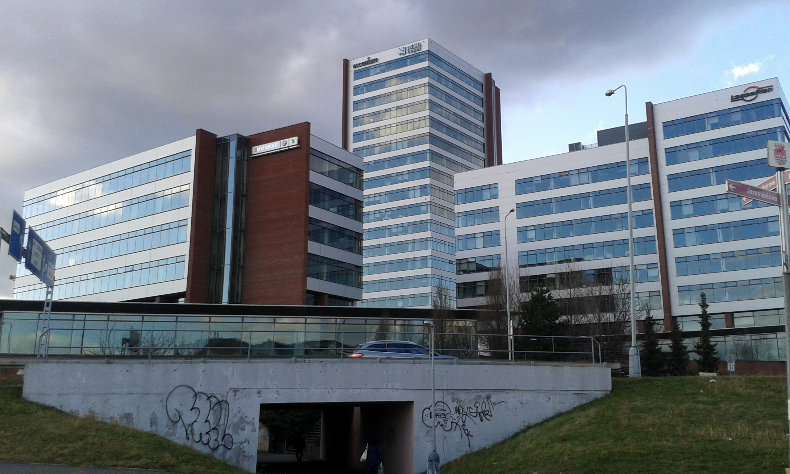 Budova Accenture Nové Butovice